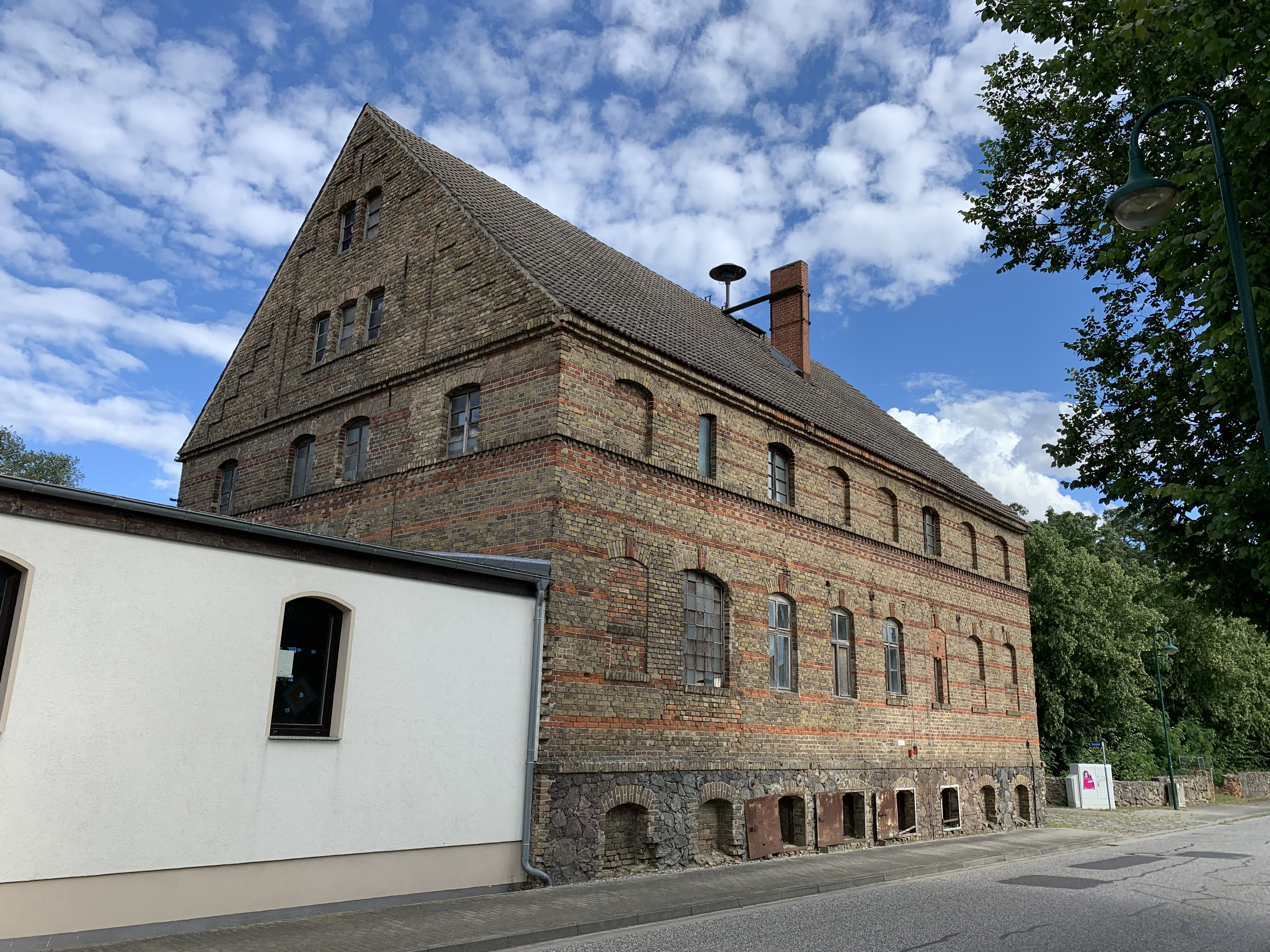 Brusendorf, ein Ortsteil der Stadt Mittenwalde in Brandenburg